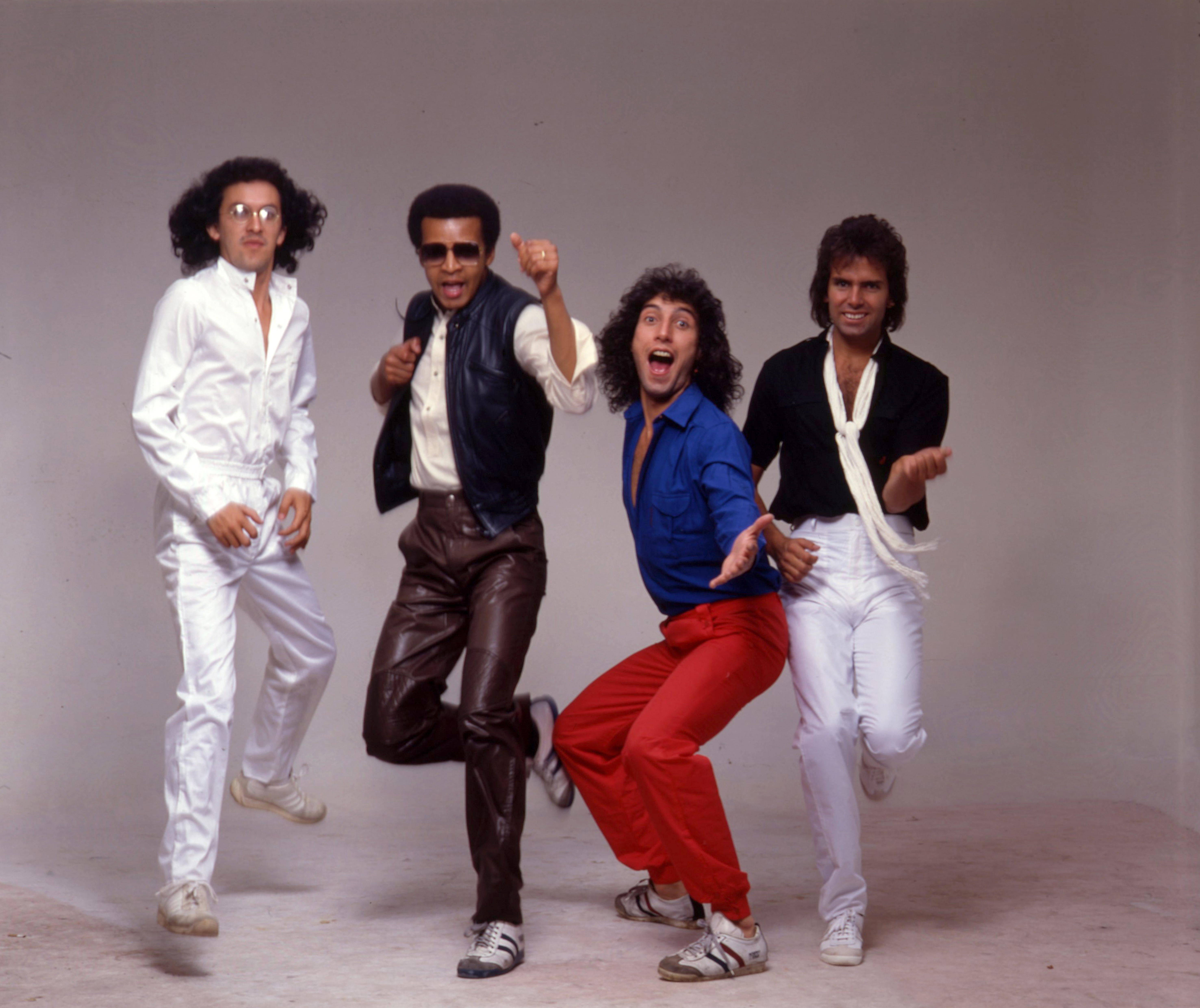 Nacho Pilonieta , Joseph Watto, Alexei Restrepo y Jorge Barco